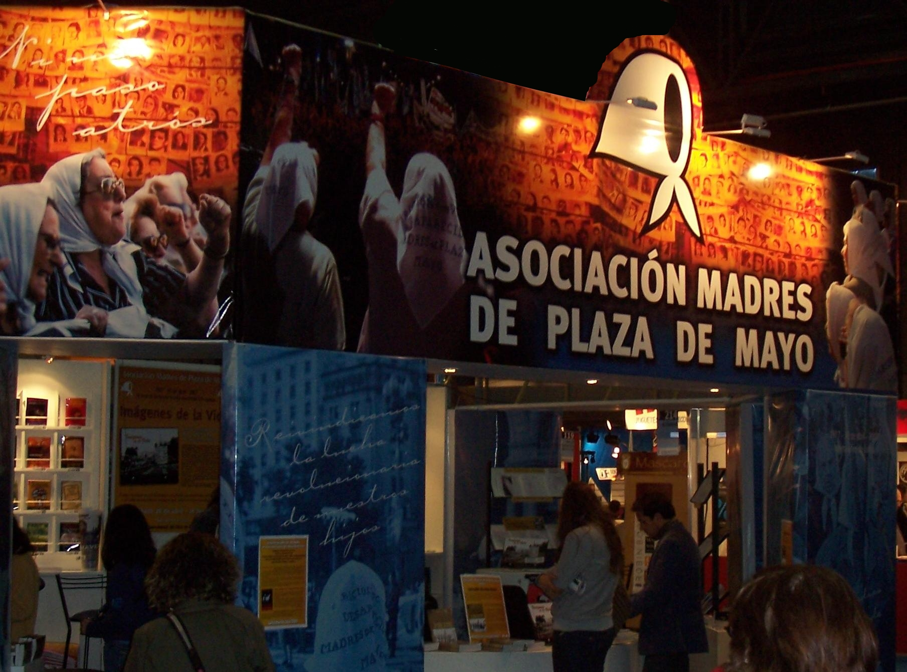 El Estand de las Madres de Plaza de Mayo en la 33° Feria Internacional del Libro en la ciudad de Buenos Aires (Argentina).